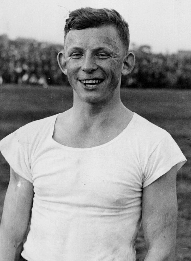 Ernest Wilimowski w 1936 roku